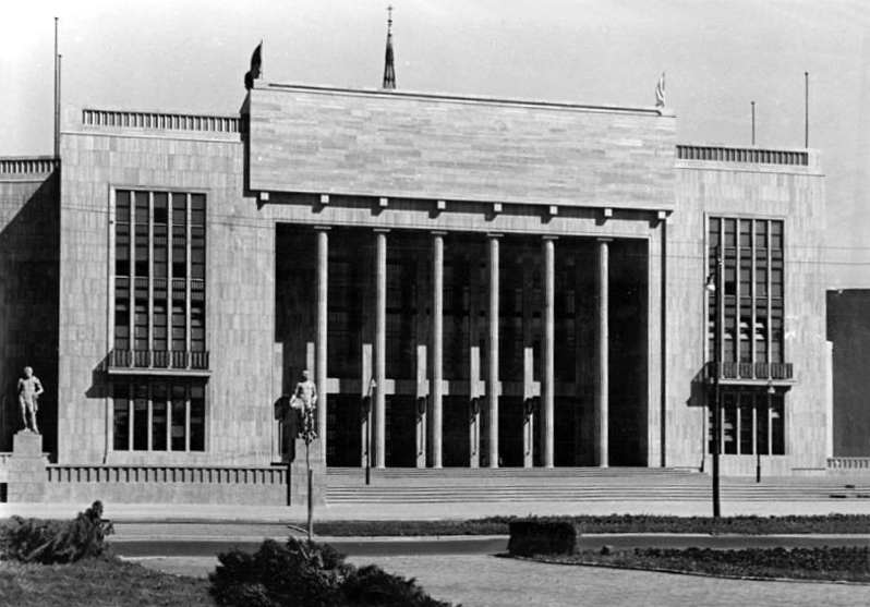 Berlin, Karl-Marx-Allee, "Deutsche Sporthalle" Zentralbild Schmidtke 29.8.51 Die Sporthalle in der Karl-Marx-Allee in Berlin. Information added by Wikimedia users.